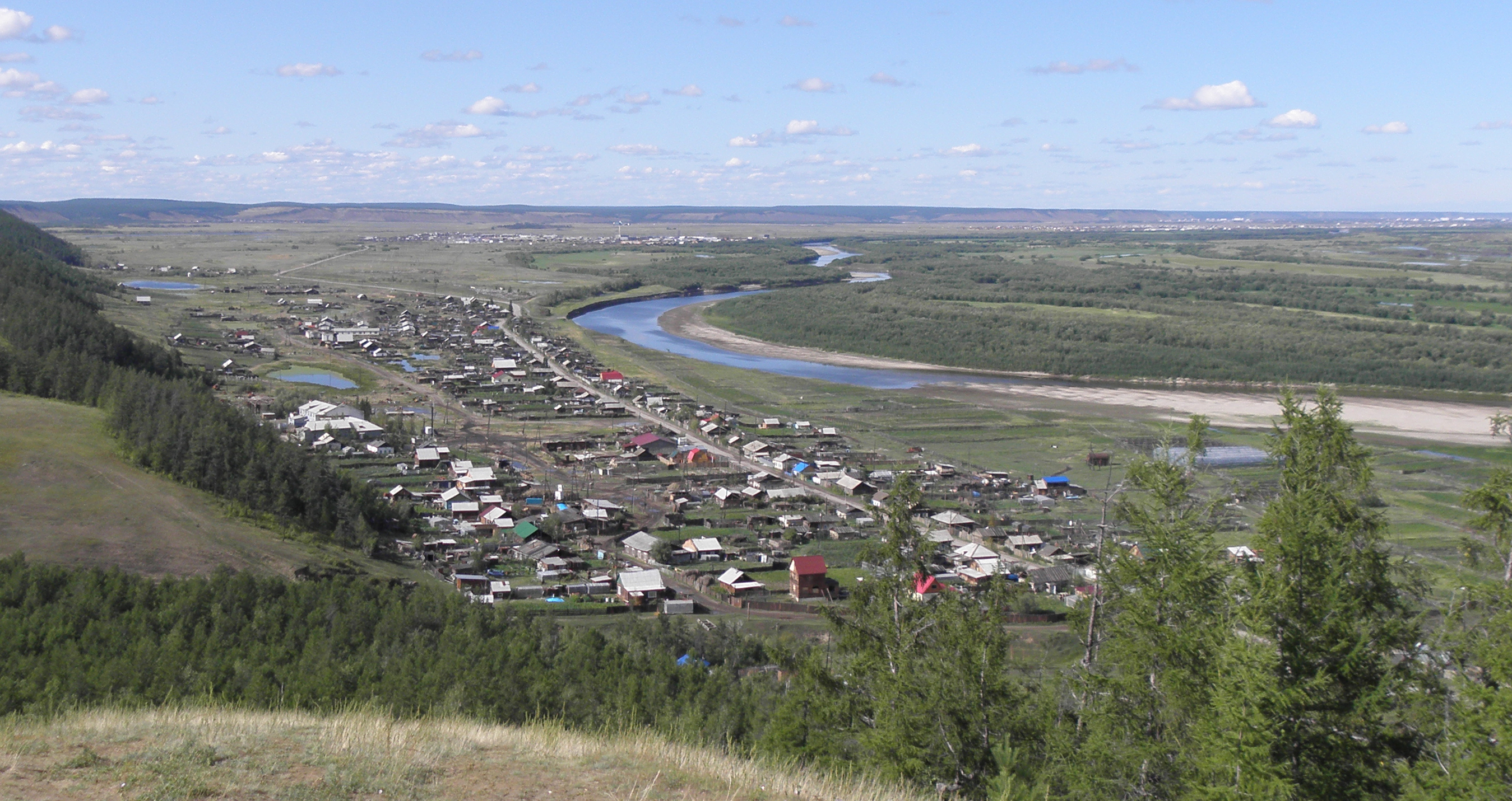 Фотография села Старая Табага (городской округ Якутск)